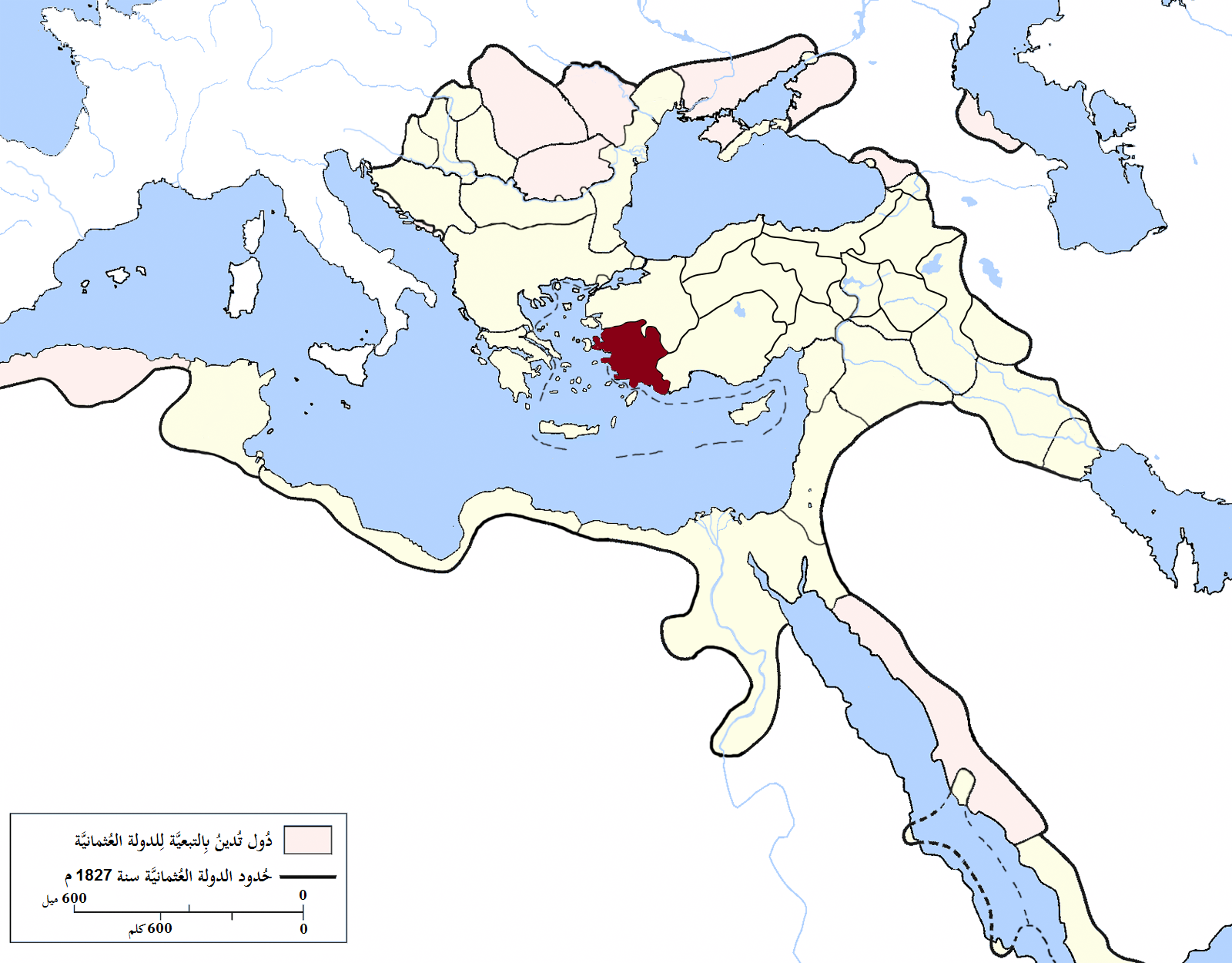 إيالة آيدين في الدولة العُثمانيَّة سنة 1827م.